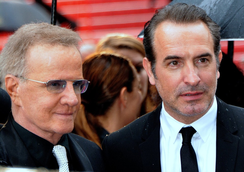 Christophe Lambert et Jean Dujardin au Festival de Cannes 2019.